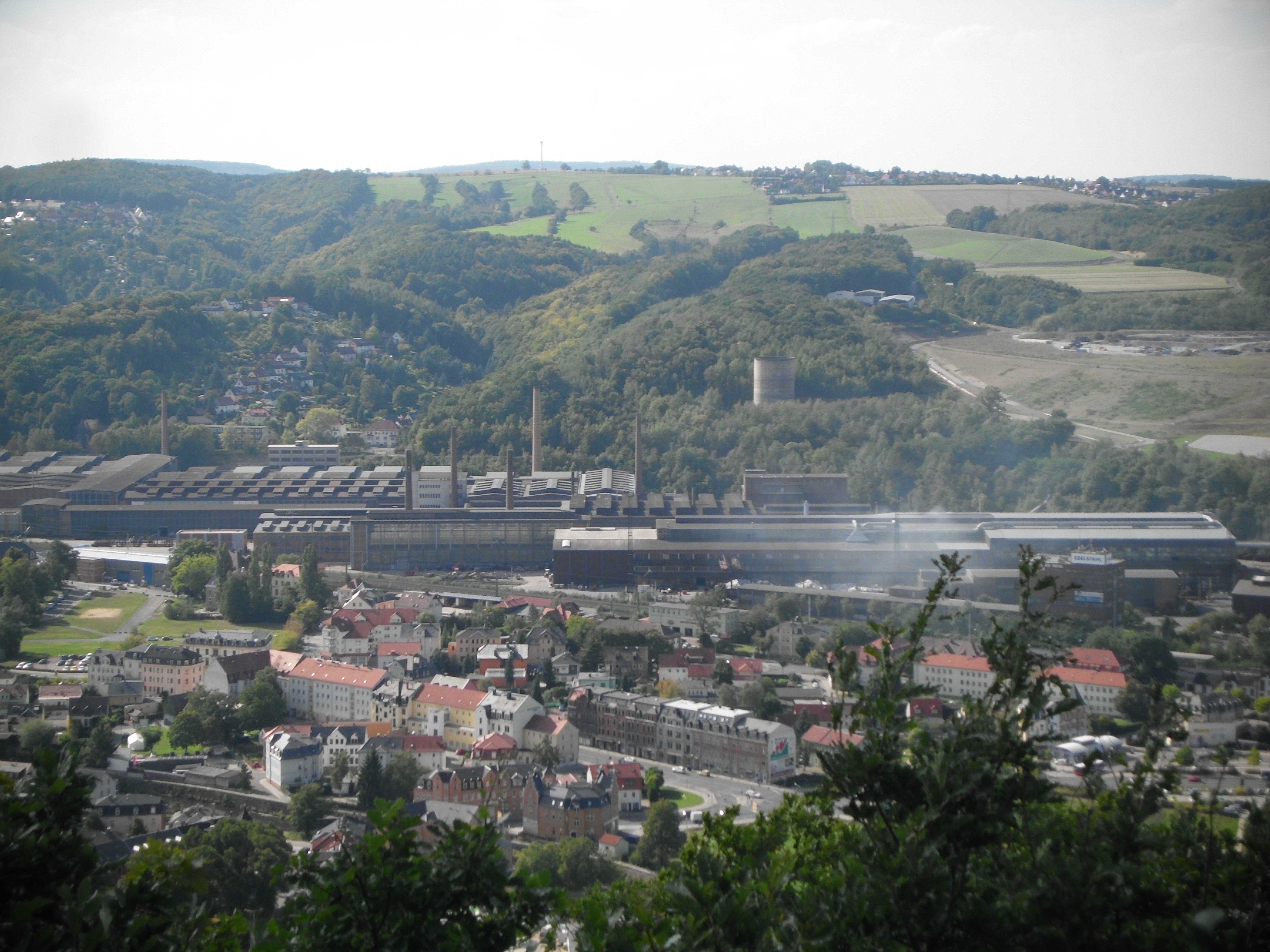 Blick vom König-Albert-Denkmal auf dem Windberg auf das Edelstahlwerk in Freital-Deuben